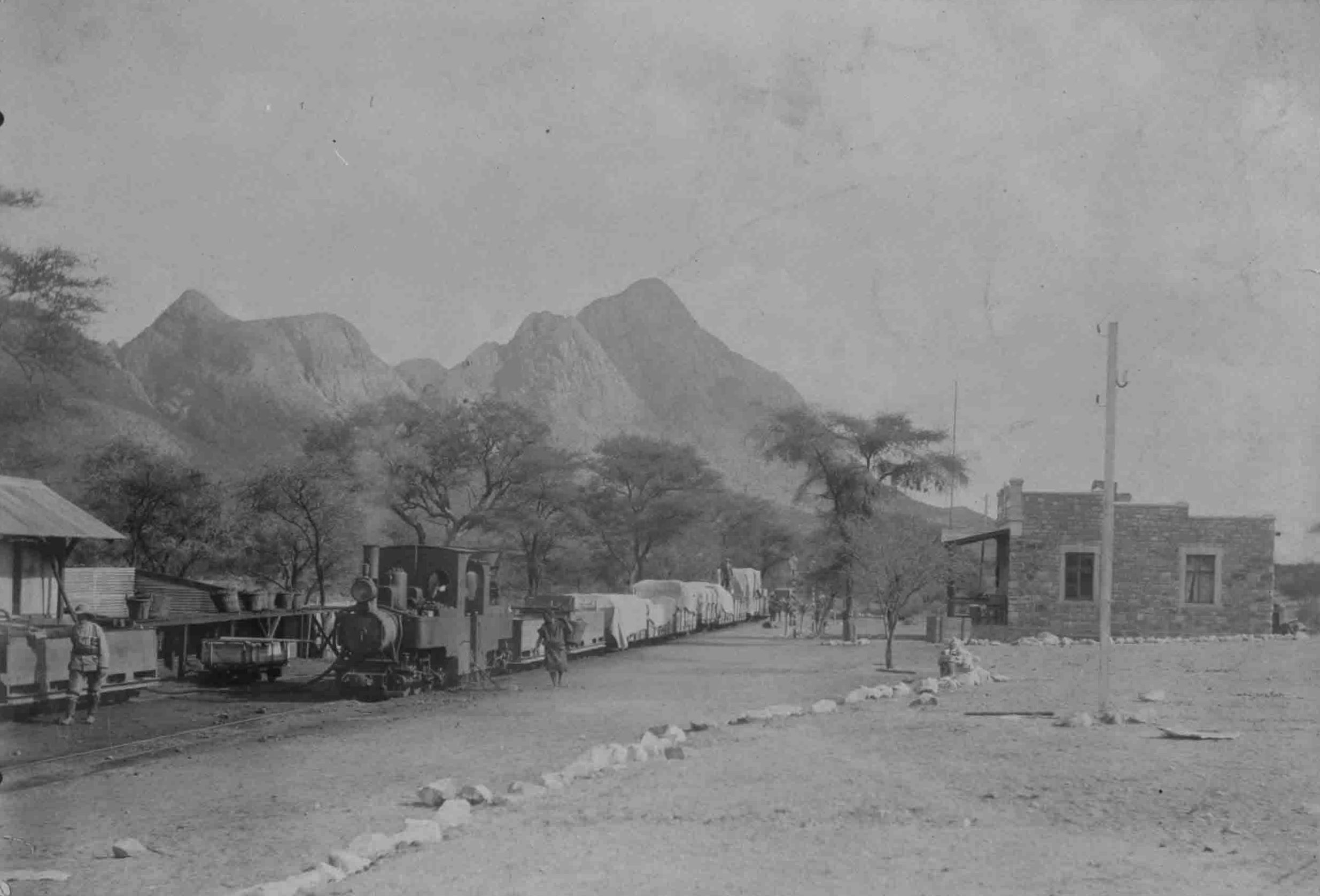 Zug im Bahnhof Abbabis, auf der mit einer Spurweite von 600 mm erbauten rund 380 km langen Bahnstrecke Swakopmund–Windhoek, im damaligen Deutsch-Südwestafrika, heute Namibia. An der Spitze des Zuges eine Brigade-Feldbahn Dampflokomotive vom Typ Zwillinge mit der Bauart Cn2t+Cn2t, gefolgt von zwei Wasserwagen und mehreren Güterwagen. Die mit einfachsten Mitteln erbaute Bahn, die anfänglich durch das Kaiserliche Eisenbahnkommando betrieben wurde, ist eher einer Kleinbahn als denn einer Feldbahn zuzuordnen. Das Bild, der Originaldatensatz, wurde zugeschnitten. Standort: 2401/StuUB Bildnummer: 071-2401-55 CD-Code: CD/7245/2012/1912/7245_2012_1912_0007 Text auf dem Bild: Woeckner-Album Text auf der Hülle: Ababis Format Bildträger: 13x18 Formale Bemerkung: Auf Briefumschlag: August Langhage, Berlin Grunewald, Hohenzollerndamm 77